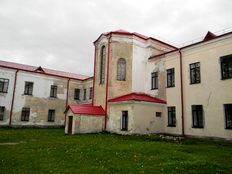 Нясвіж. Былы кляштар бенедыкцінак